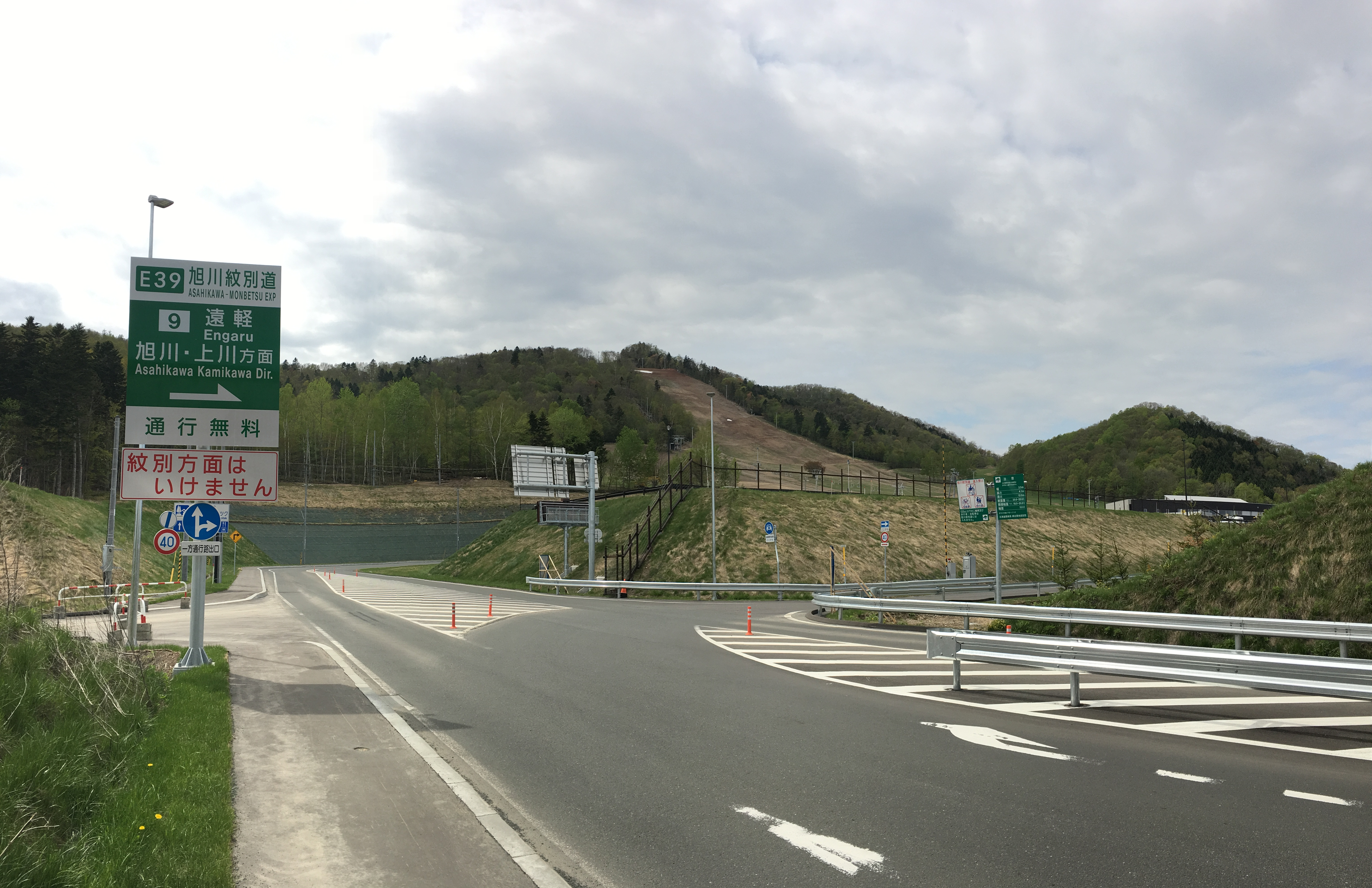 旭川紋別自動車道ja:遠軽インターチェンジ旭川方面入口（紋別郡遠軽町）